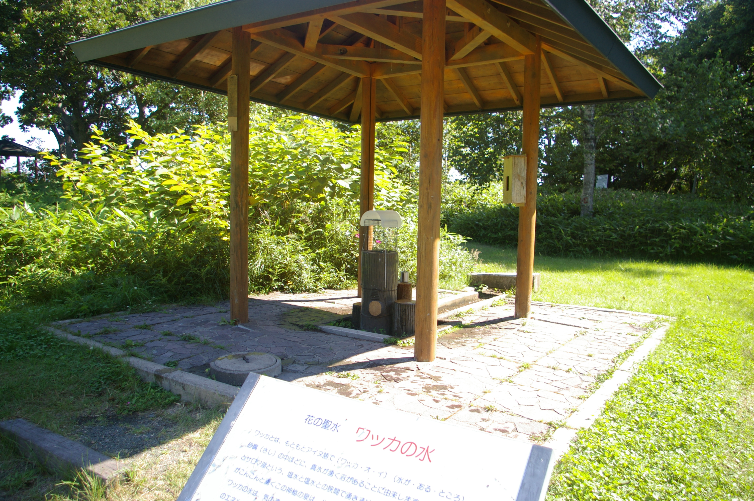 ワッカ原生花園のワッカの泉